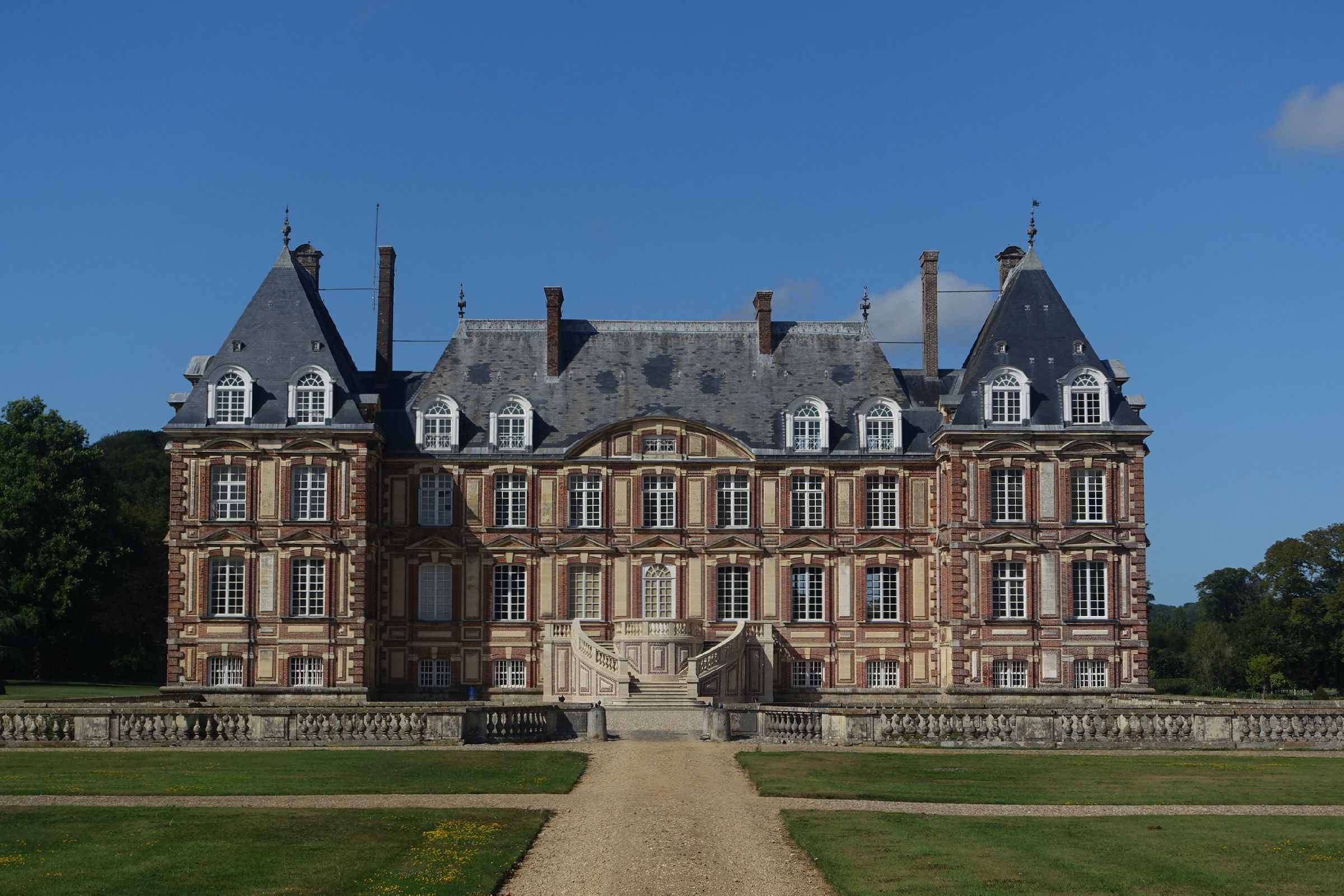 Südseite von Schloss Cany in Cany-Barville